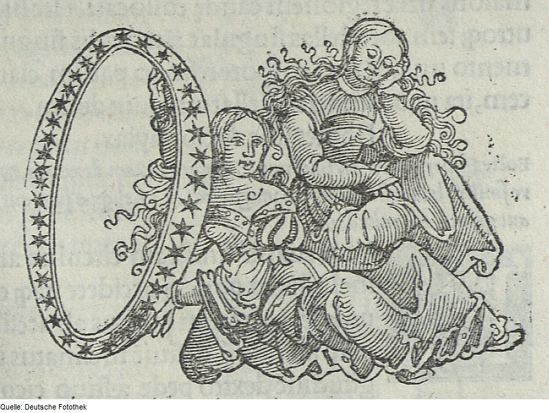 Original image description from the Deutsche Fotothek Astronomie & Sterne